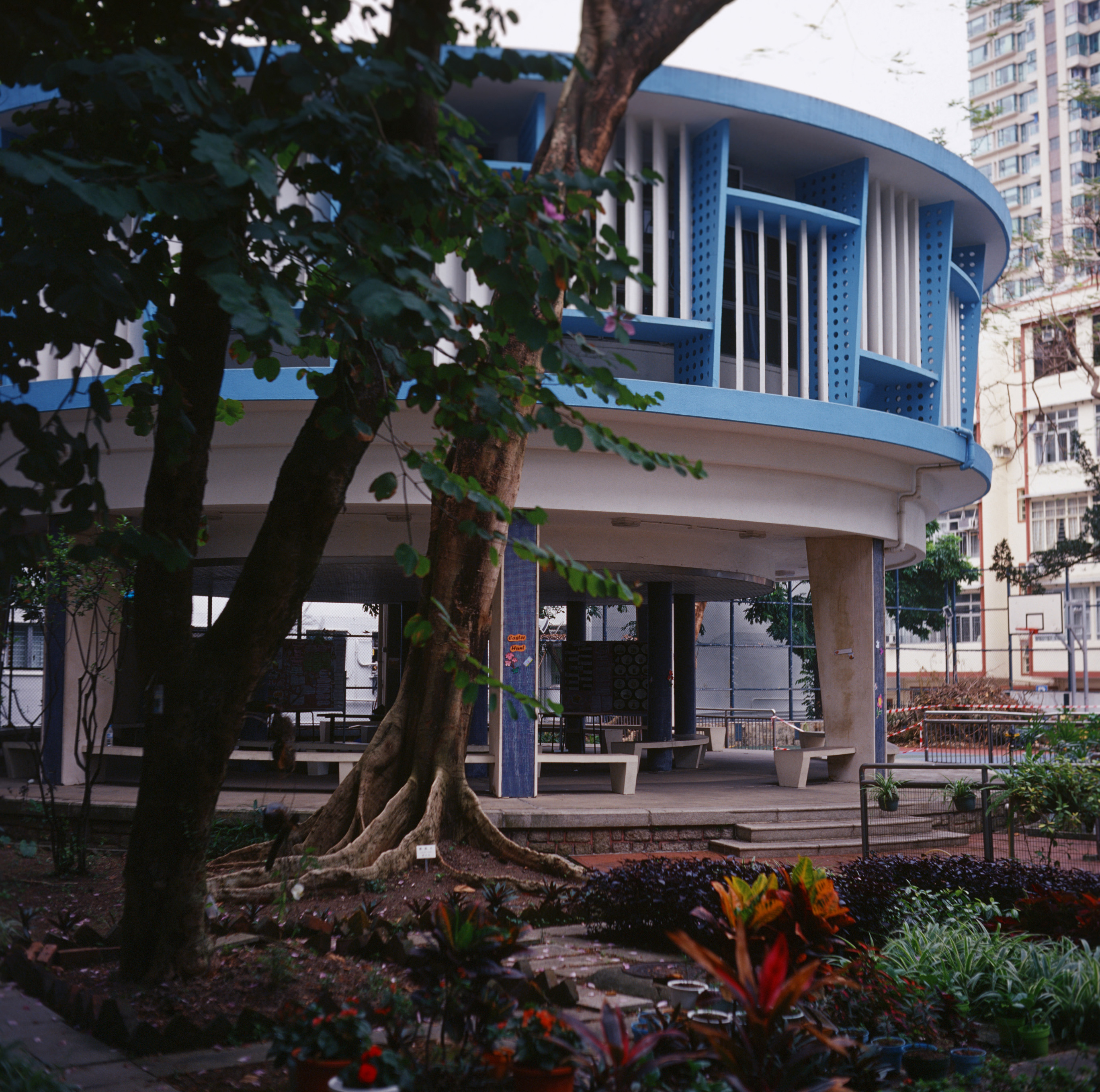 中文（香港）: 新亞中學校園內之圓亭設施